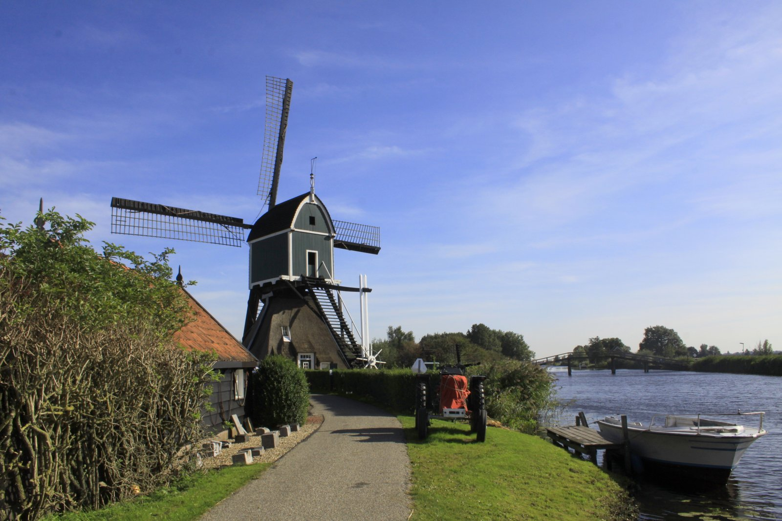 De Achterlandse Molen aan de Ammerse Boezem in het buurtschap Achterland